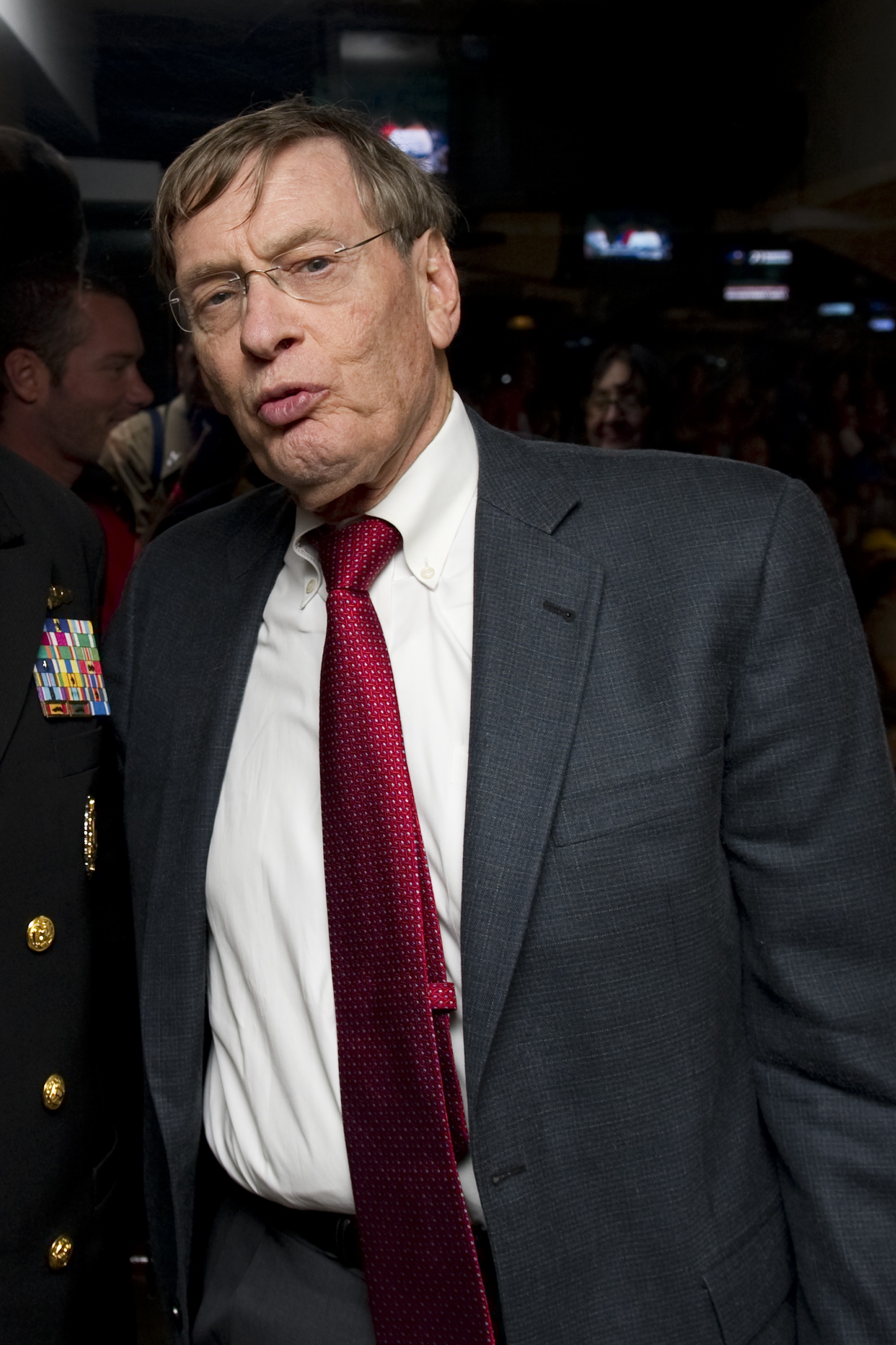 Bud Selig